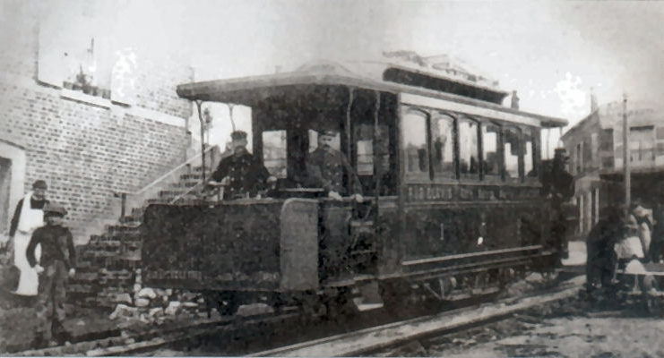 Le Havre - Motrice électrique du tramway de la Côte Sainte-Marie au terminus supérieur de la ligne